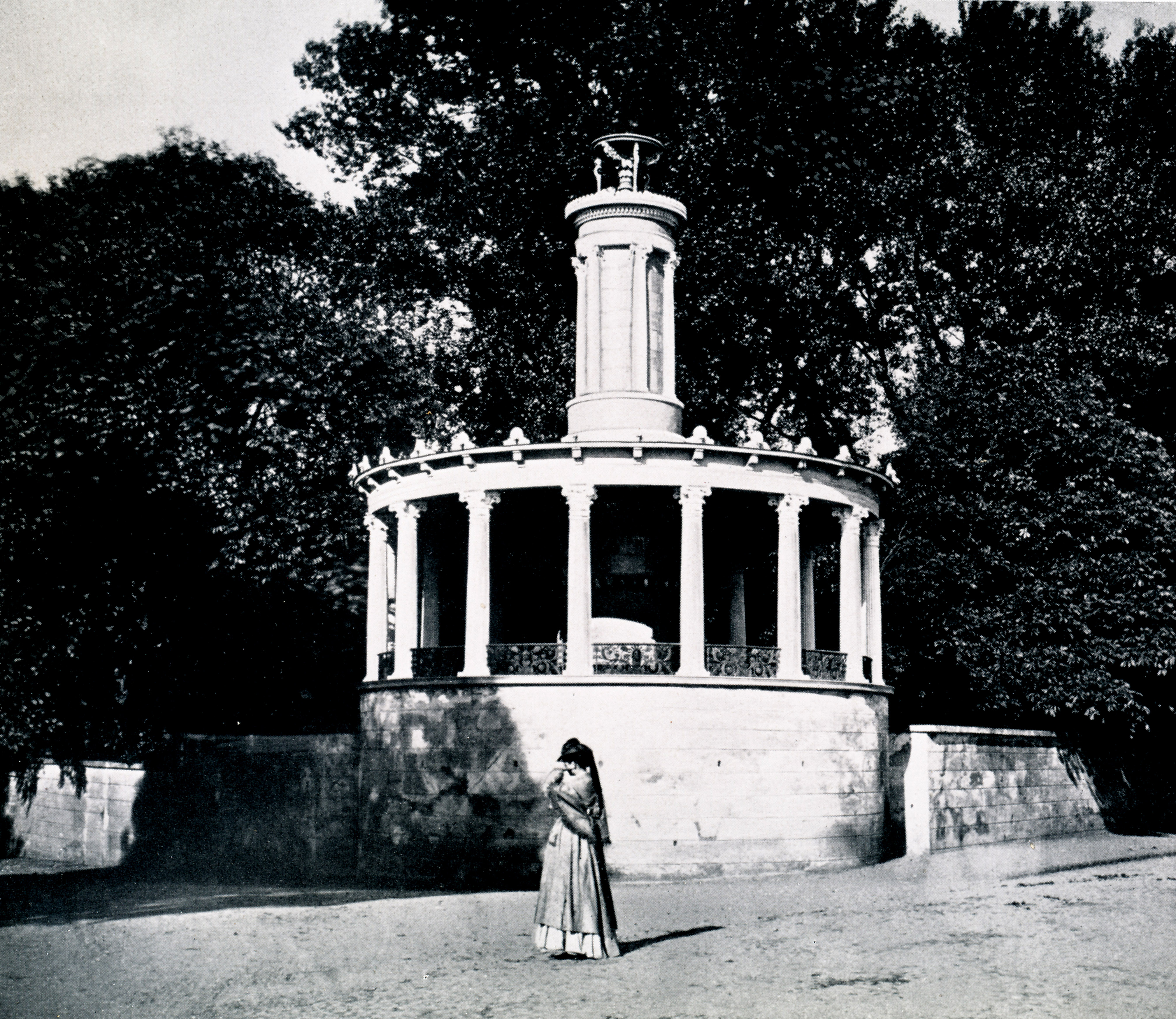 Die Rotunde am Park Klein-Glienicke, Foto von Robert Scholz, um 1875